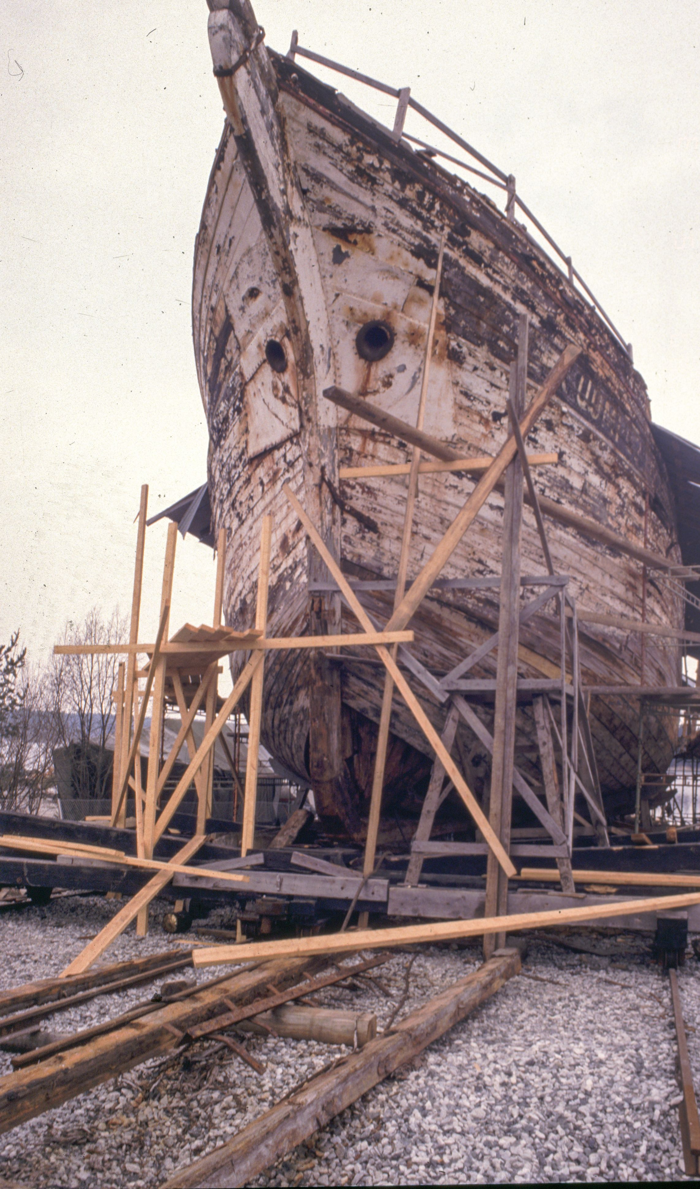 Kuunari koivisto kunnostettavana Särkisalossa 1980-luvulla